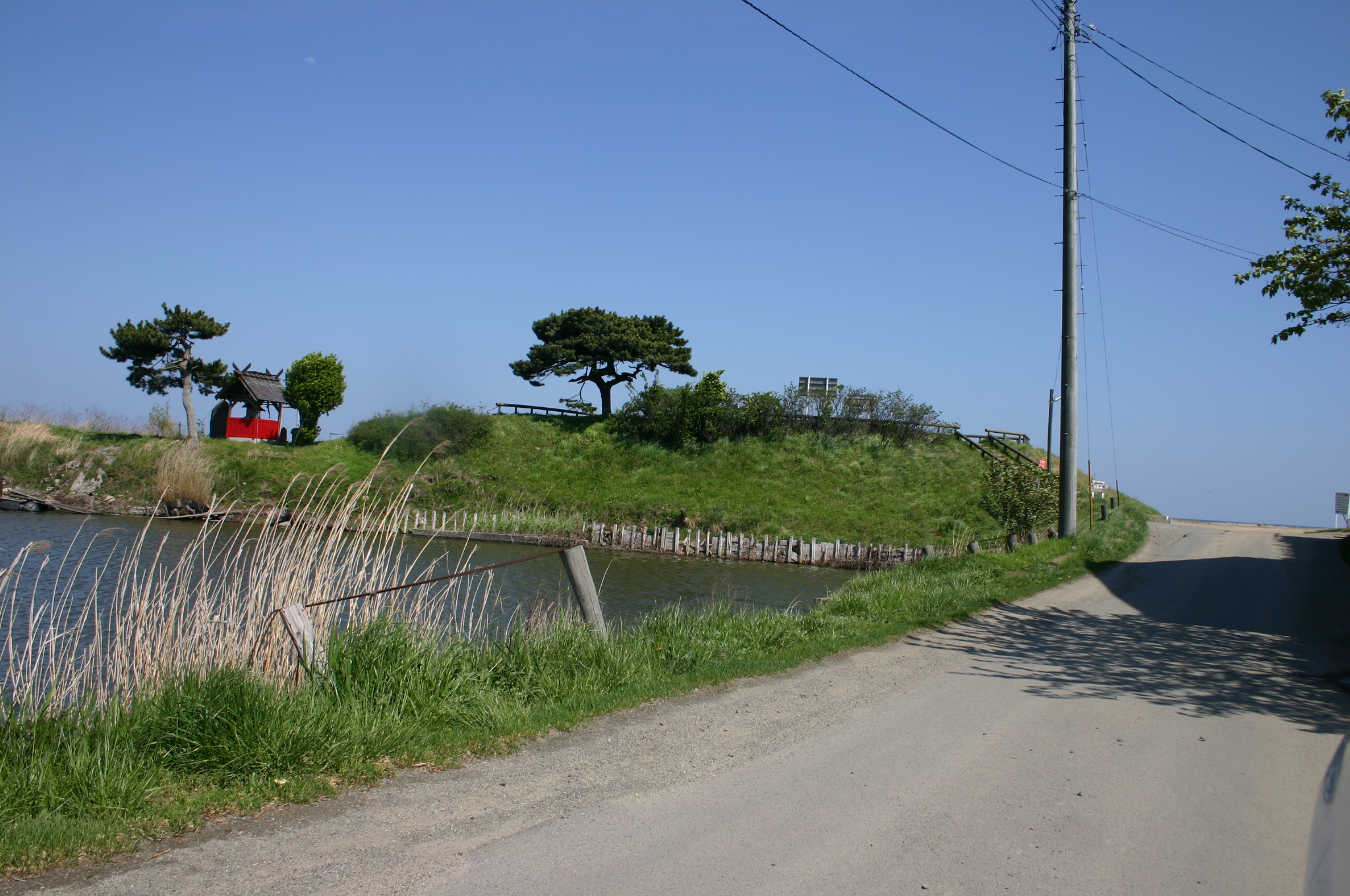 被災前の日和山遠景